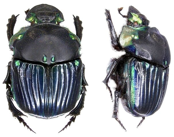 Familie: Scarabaeidae Grösse: 16-21 mm Vorkommen: Brasilien, Franz. Guiana, Surinam, Venezuela, Bolivien Fundort: Brasilien, Manaus, Rio Preto leg.det. H.Marx, 1984 Foto: U.Schmidt, 2006